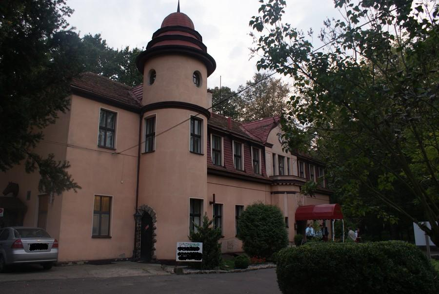 Swarzędz, pałac